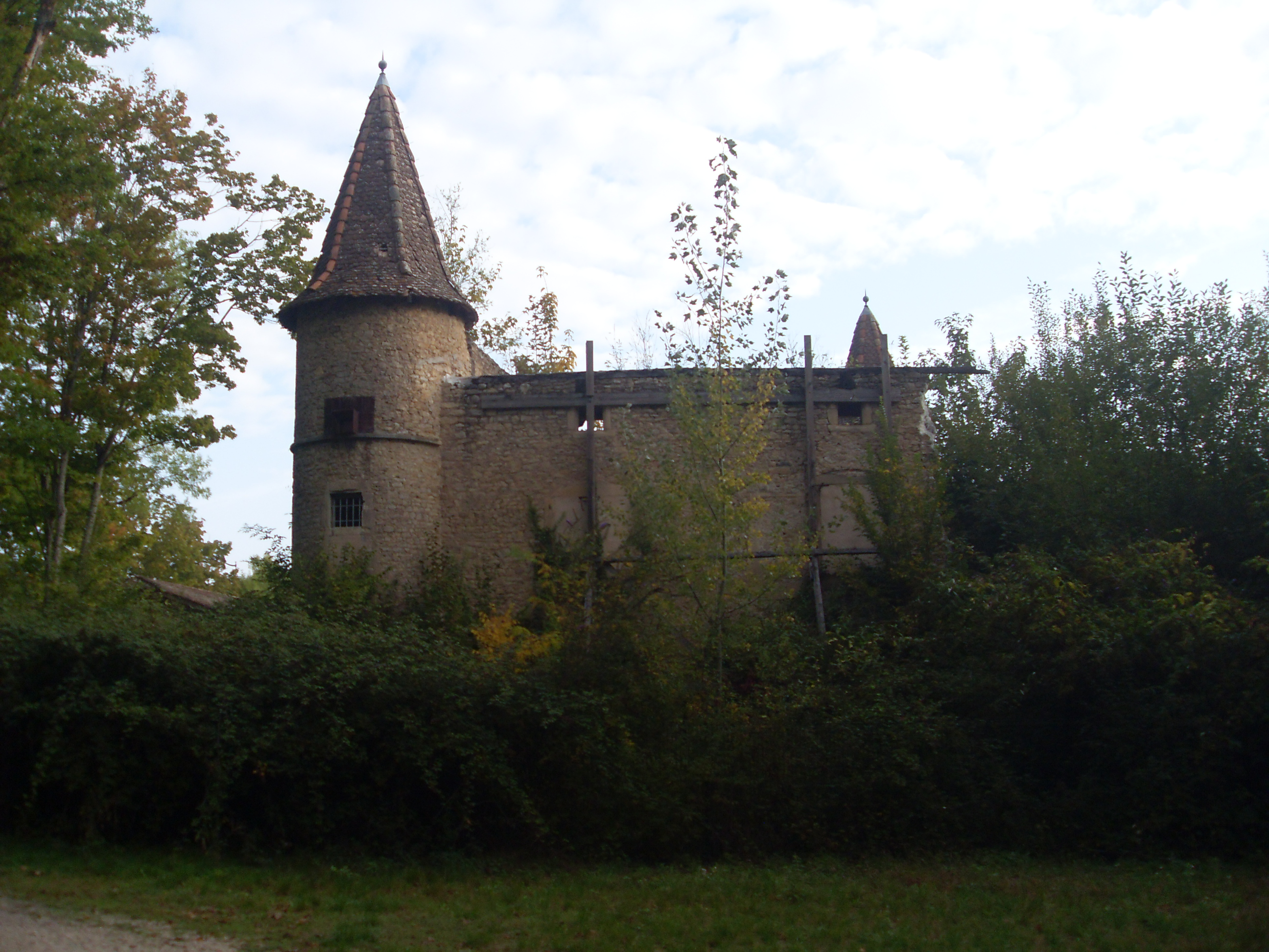 Ruines du Château du Vellein - Villefontaine (Isère).